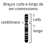 Braços curto e longo de um cromossomo